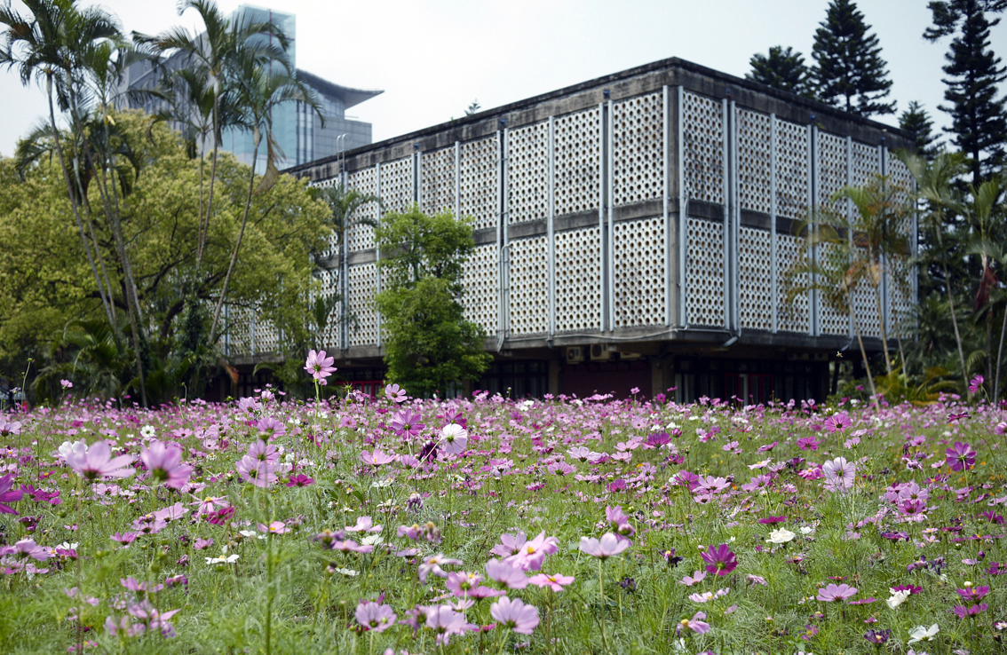 國立臺灣大學洞洞館